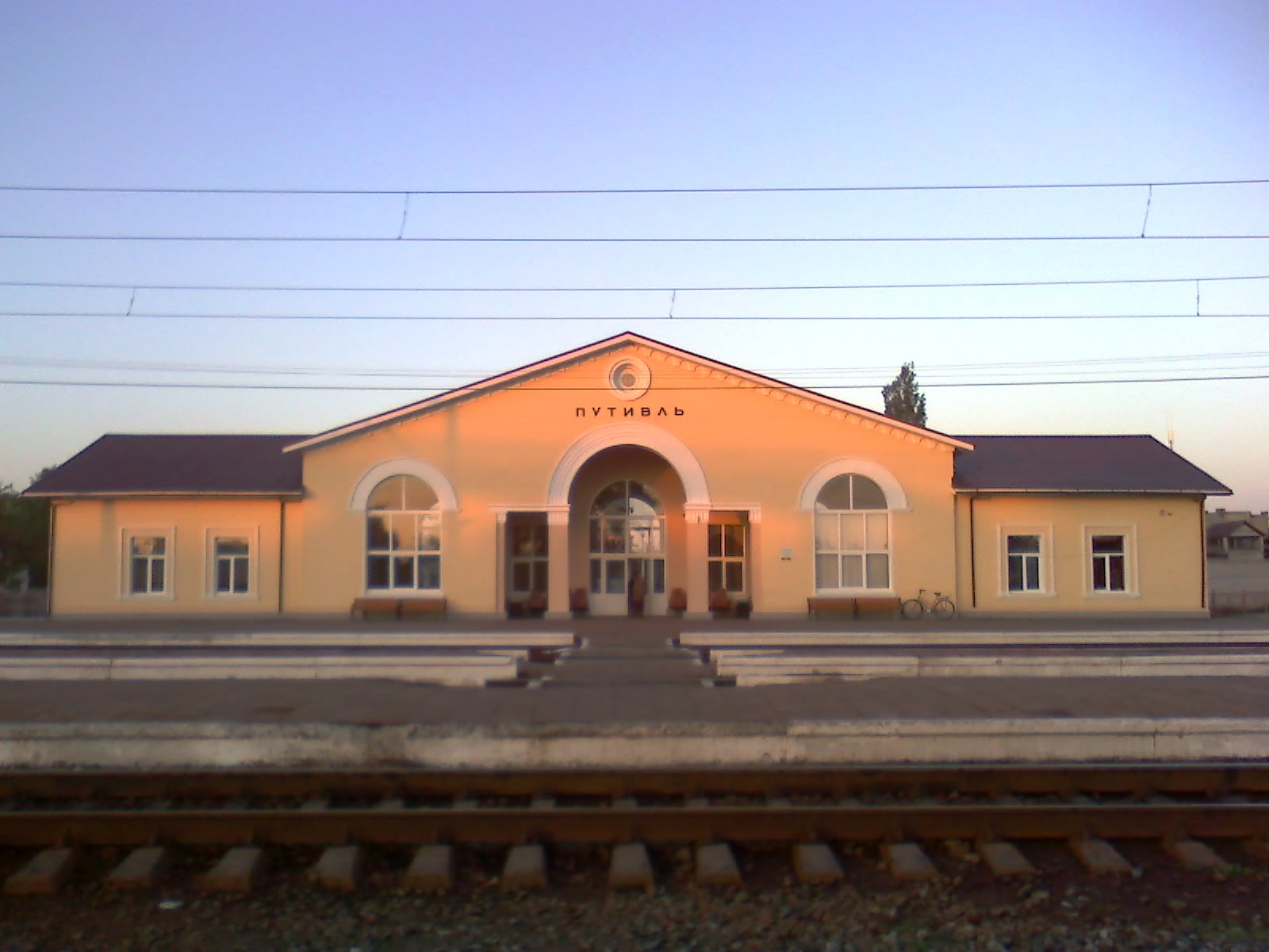 Станція Путивль